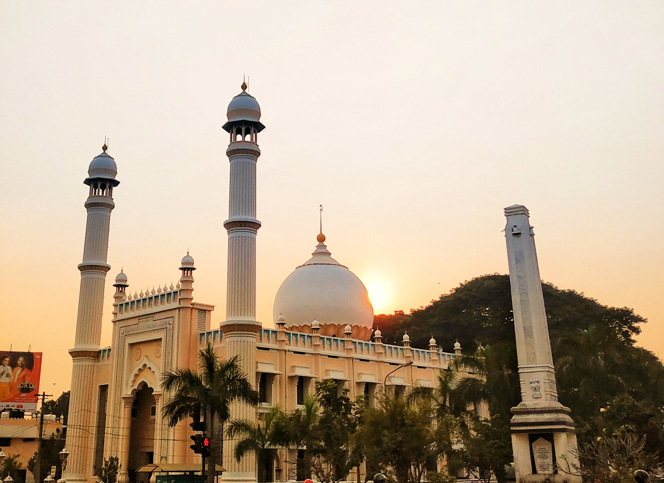 Palayalam Juma Masjid and Martyr's Column at Thiruvananthapuram